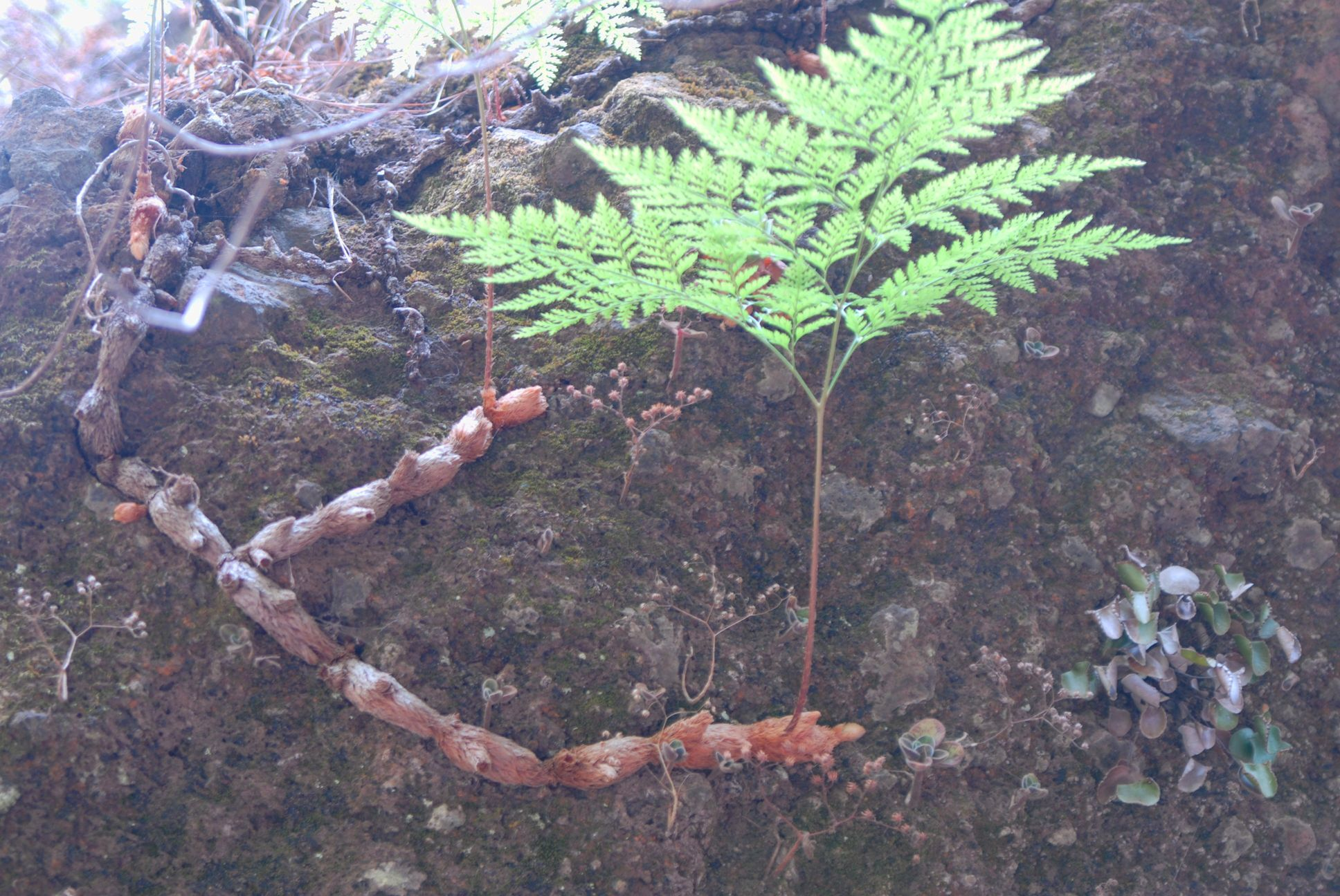 Lithophytische Lebensgemeinschaft mit Davallia canariensis auf Vulkangestein